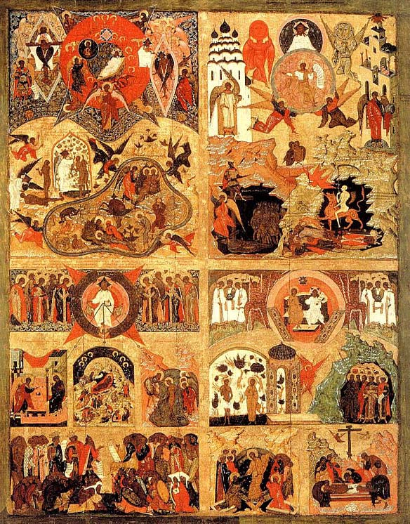 "Четырехчастная" из Благовещенского собора Московского Кремля